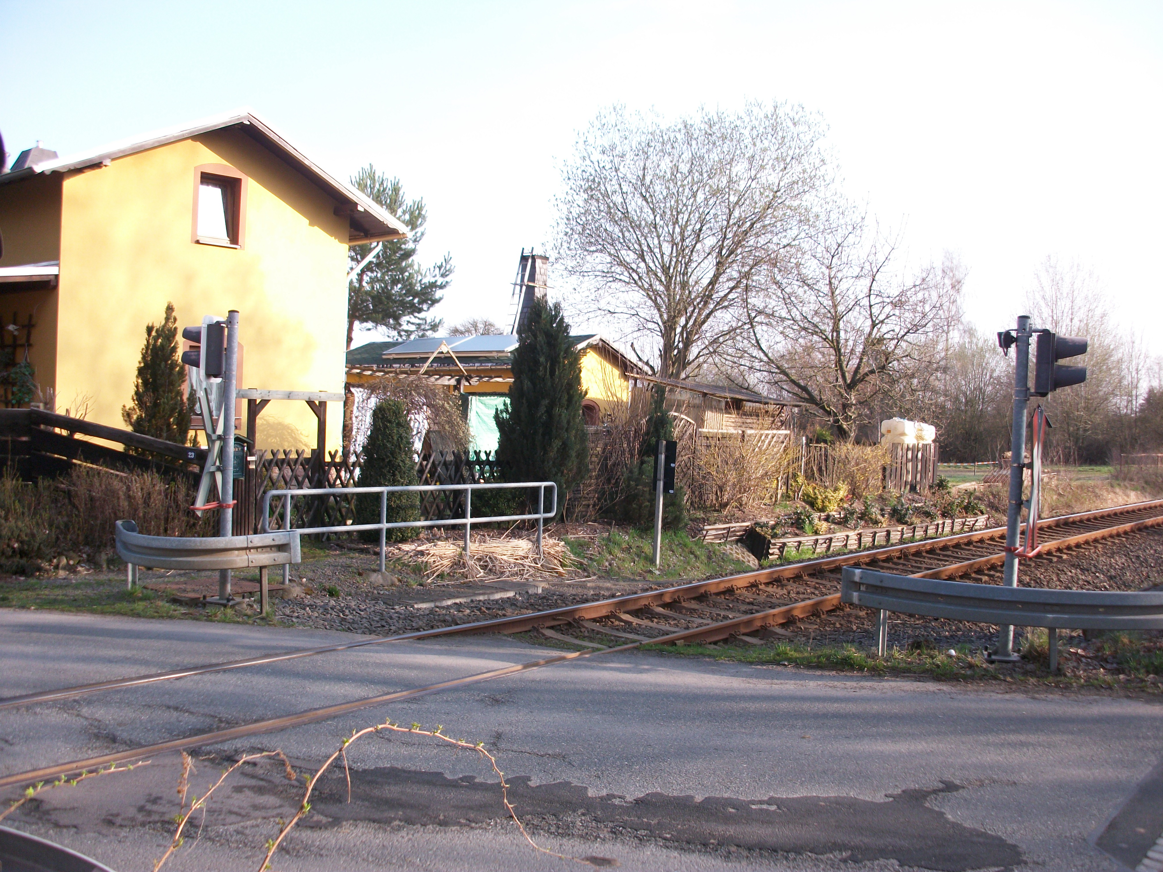 ehemaliger Hp. Frankenberg Süd in Gunnersdorf (2016)